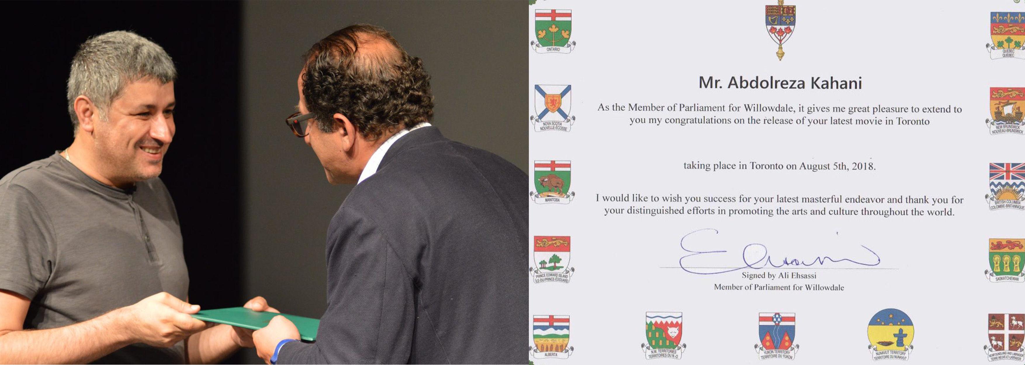 مراسم تقدیر از عبدالرضاکاهانی در پارلمان کانادا